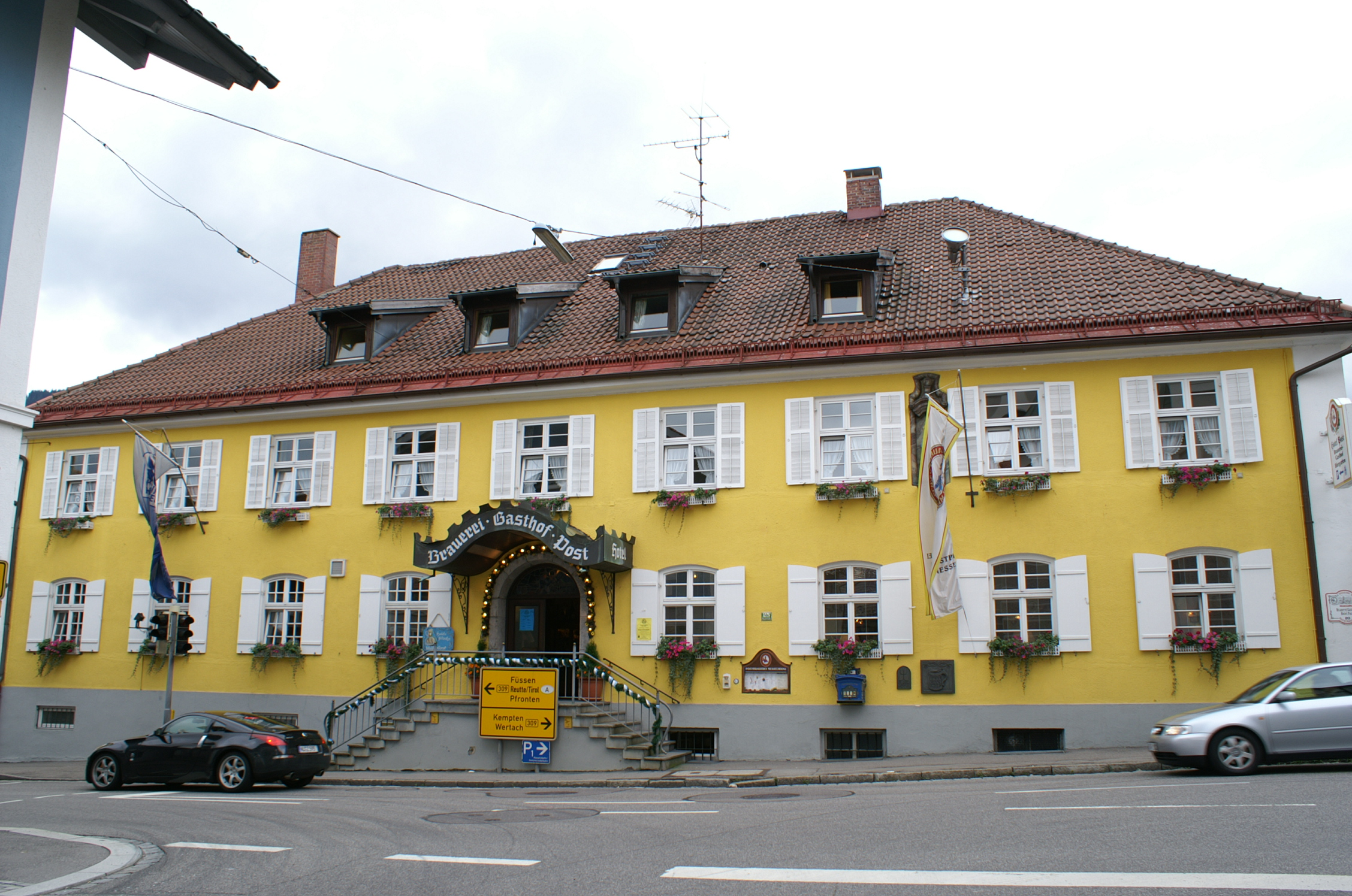 Hauptstr. 25, Gasthof Post, Nesselwang